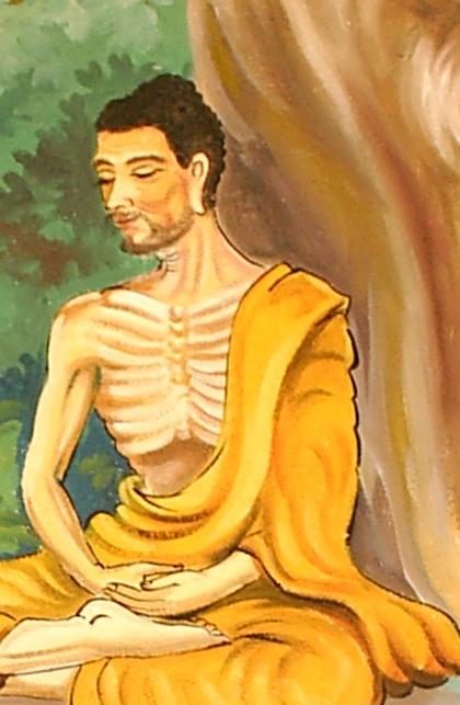 Siddhartha Gautama meditating.